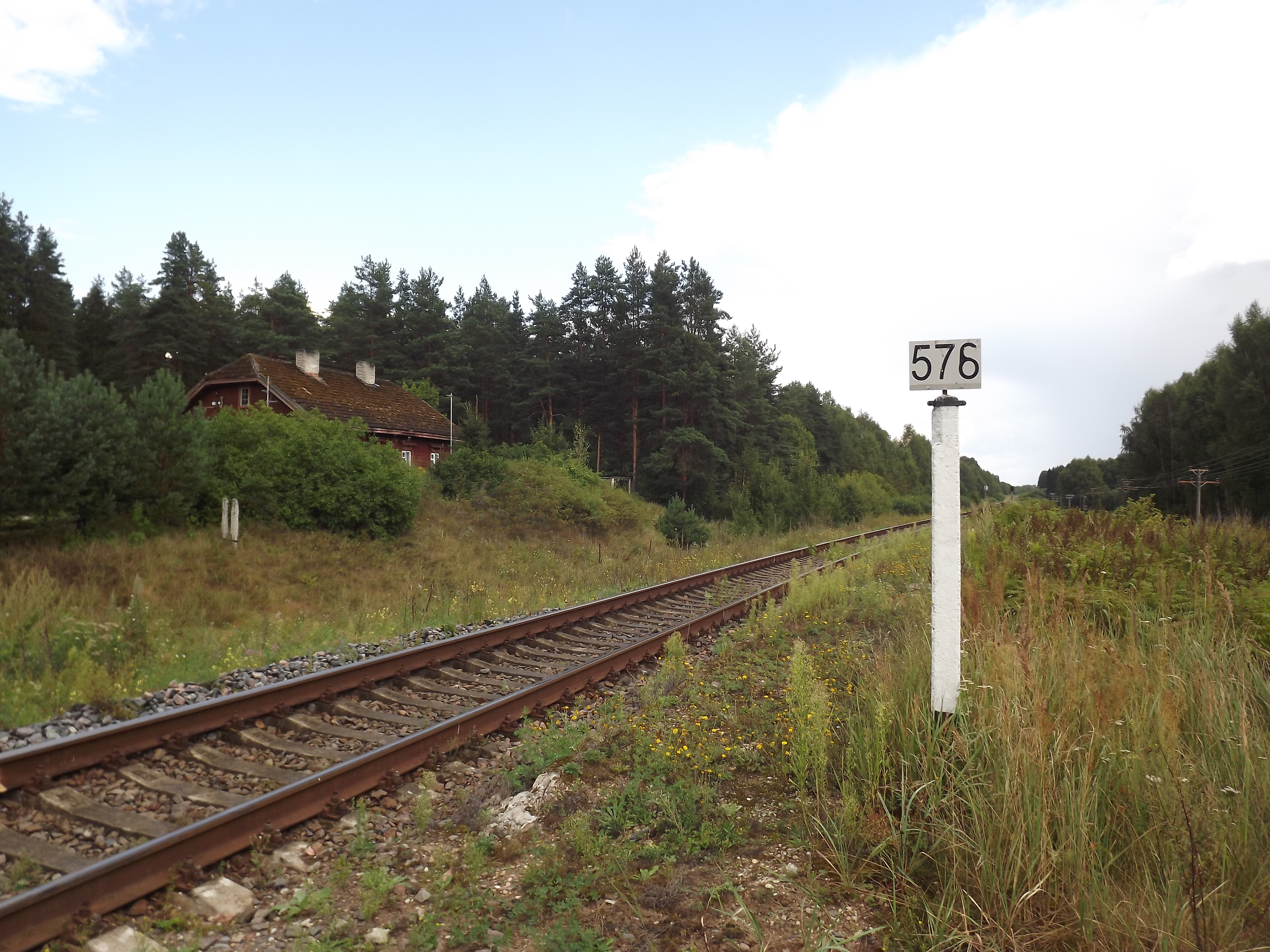 Endine Nõnova raudteepeatus aastal 2014. Paremal perrooni jäänused.